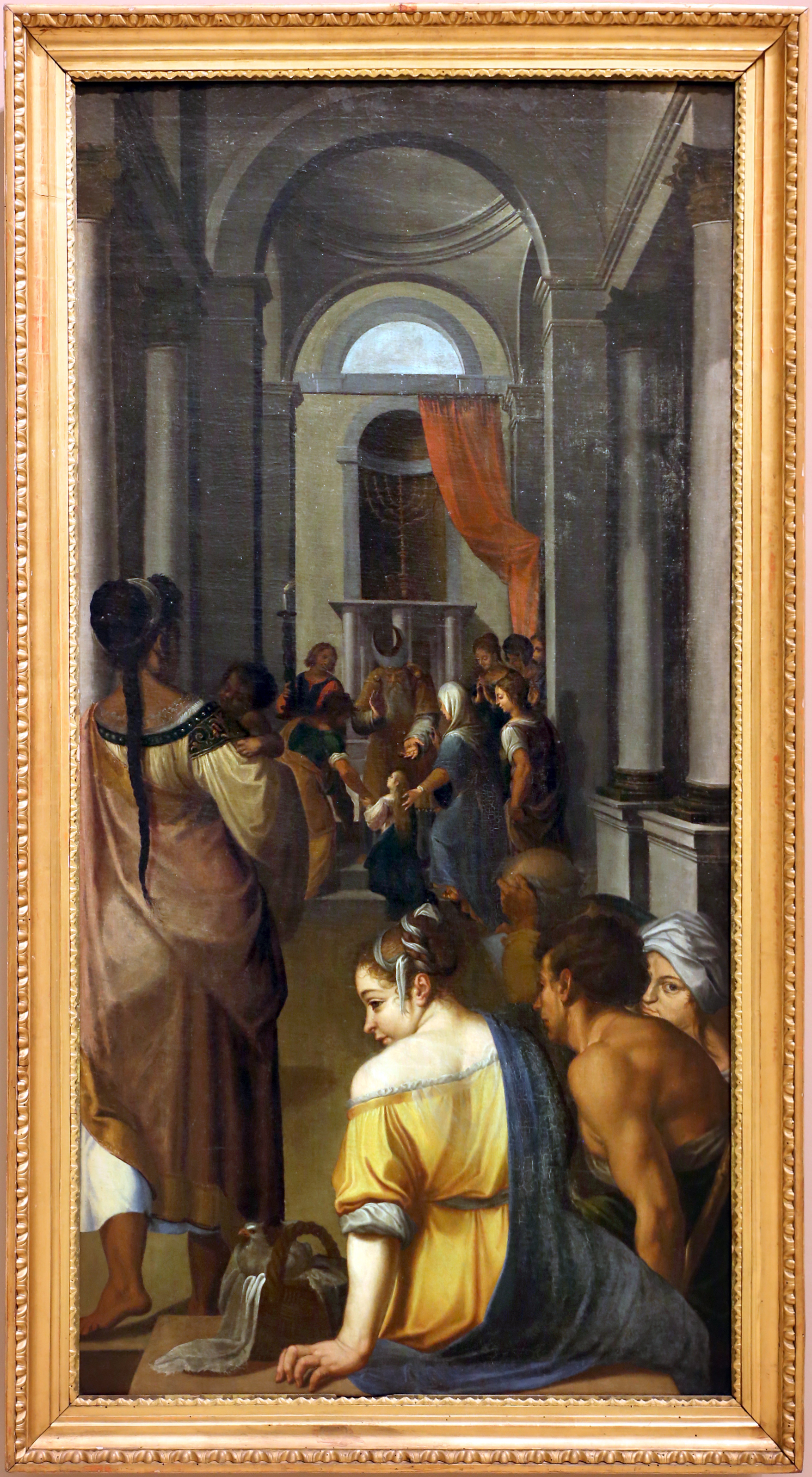 Palazzo dei Musei (Modena) This is a photo of a monument which is part of cultural heritage of Italy.